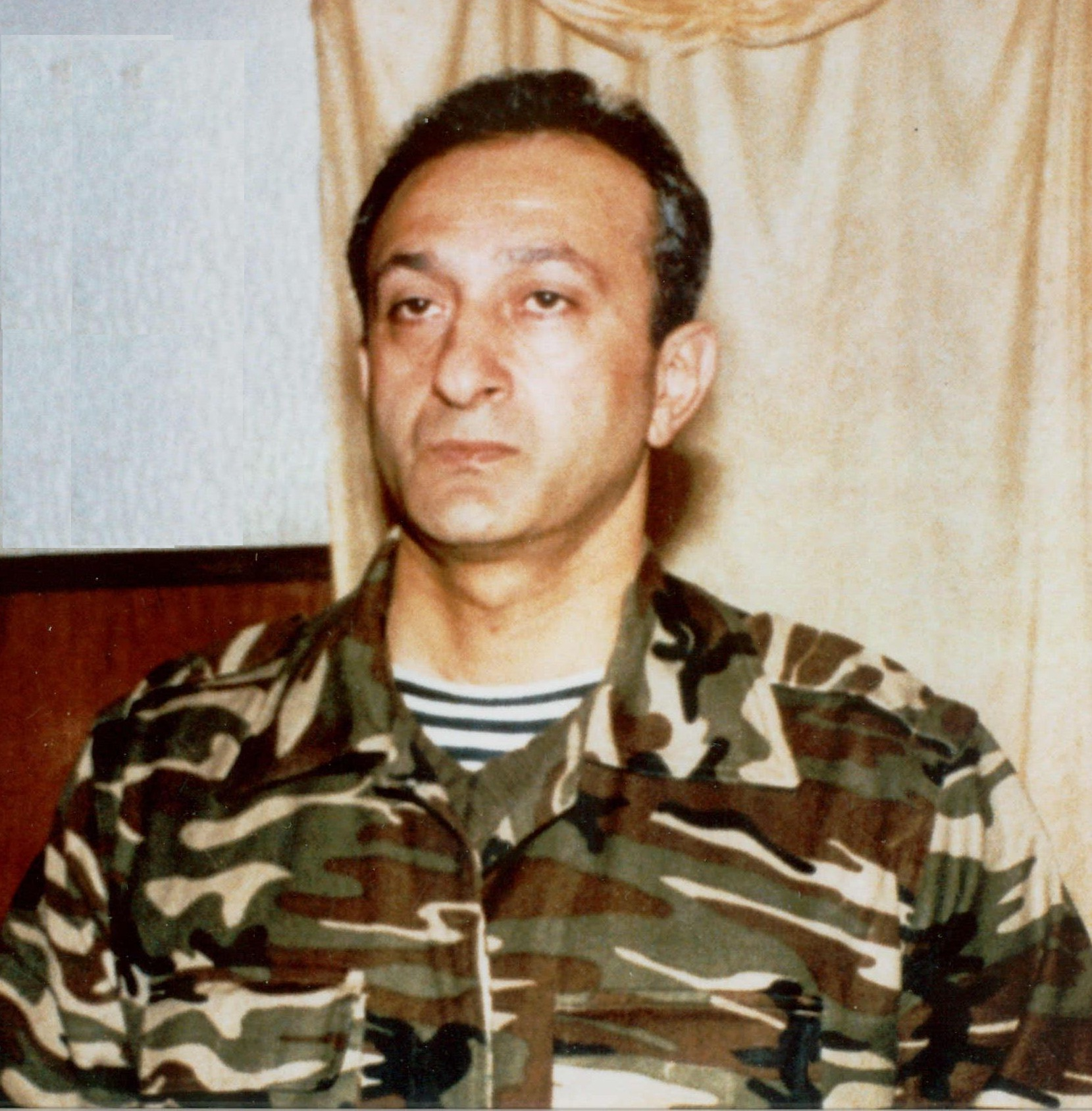 Фотография сделана мною 1 марта 1995 года на базе ОПОН в Баку